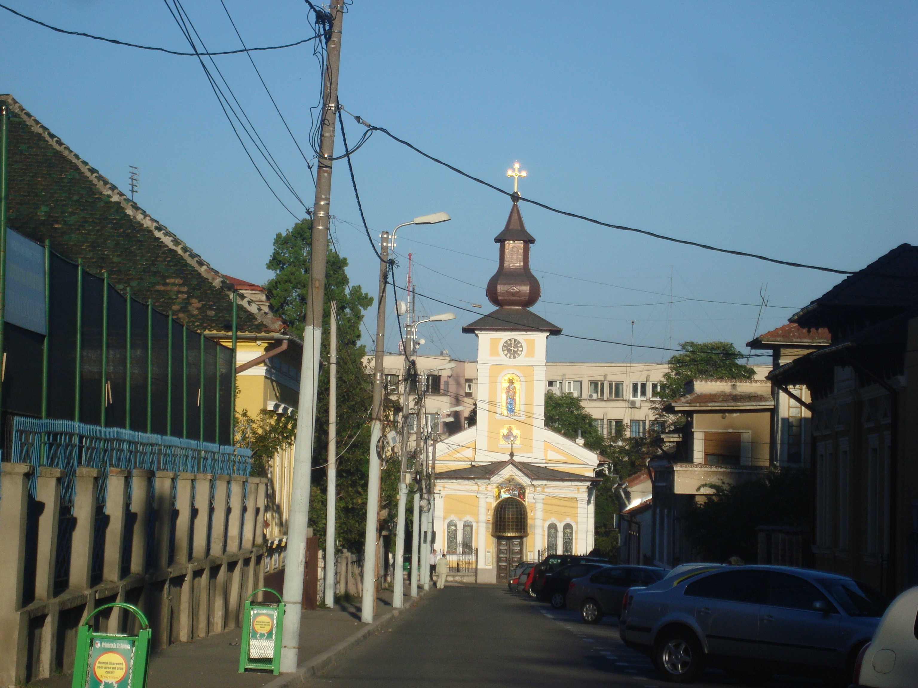 Biserica